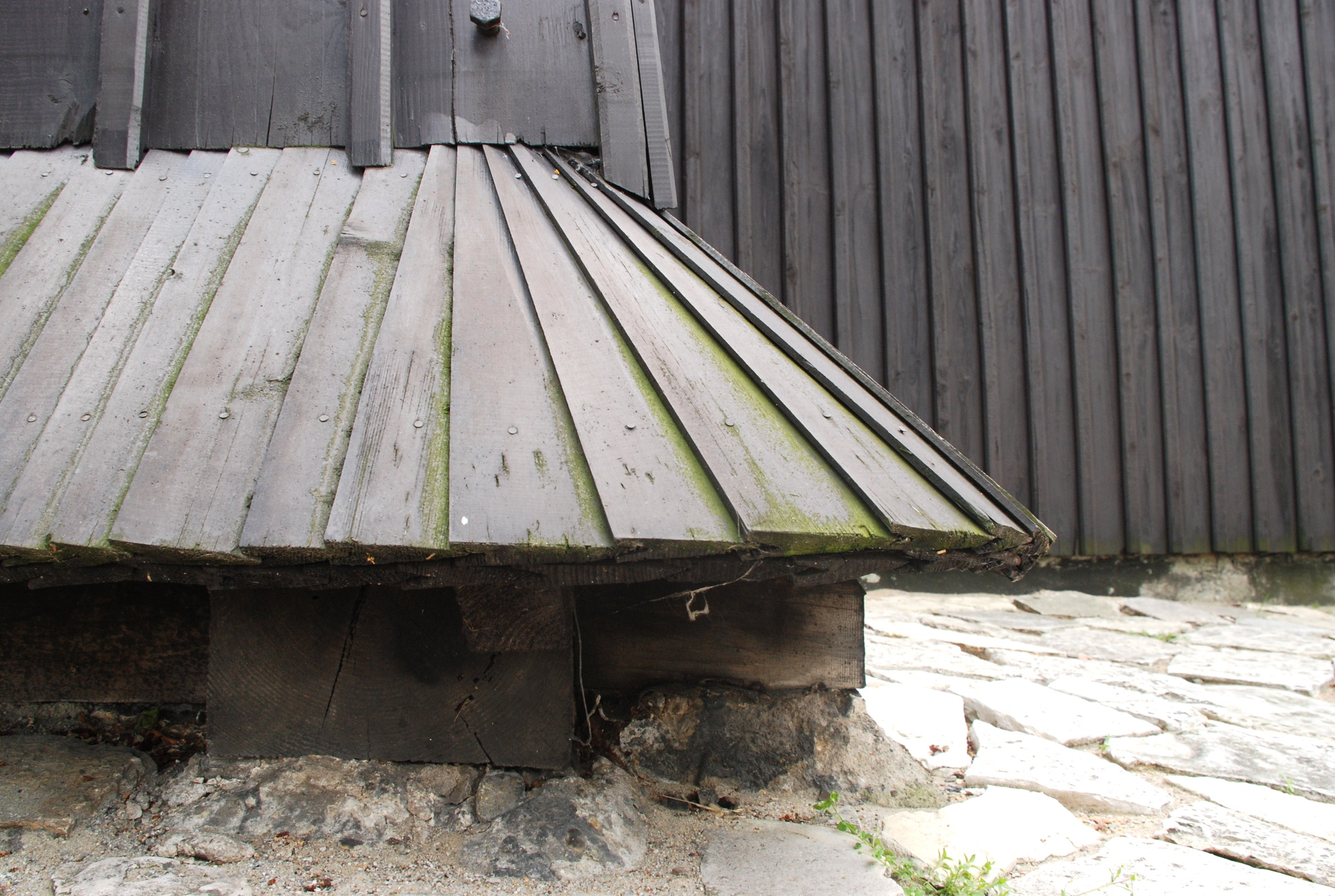 Daszek okapowy w kościele pw. św. Apostołów Piotra i Pawła w Mikołowie-Paniowach